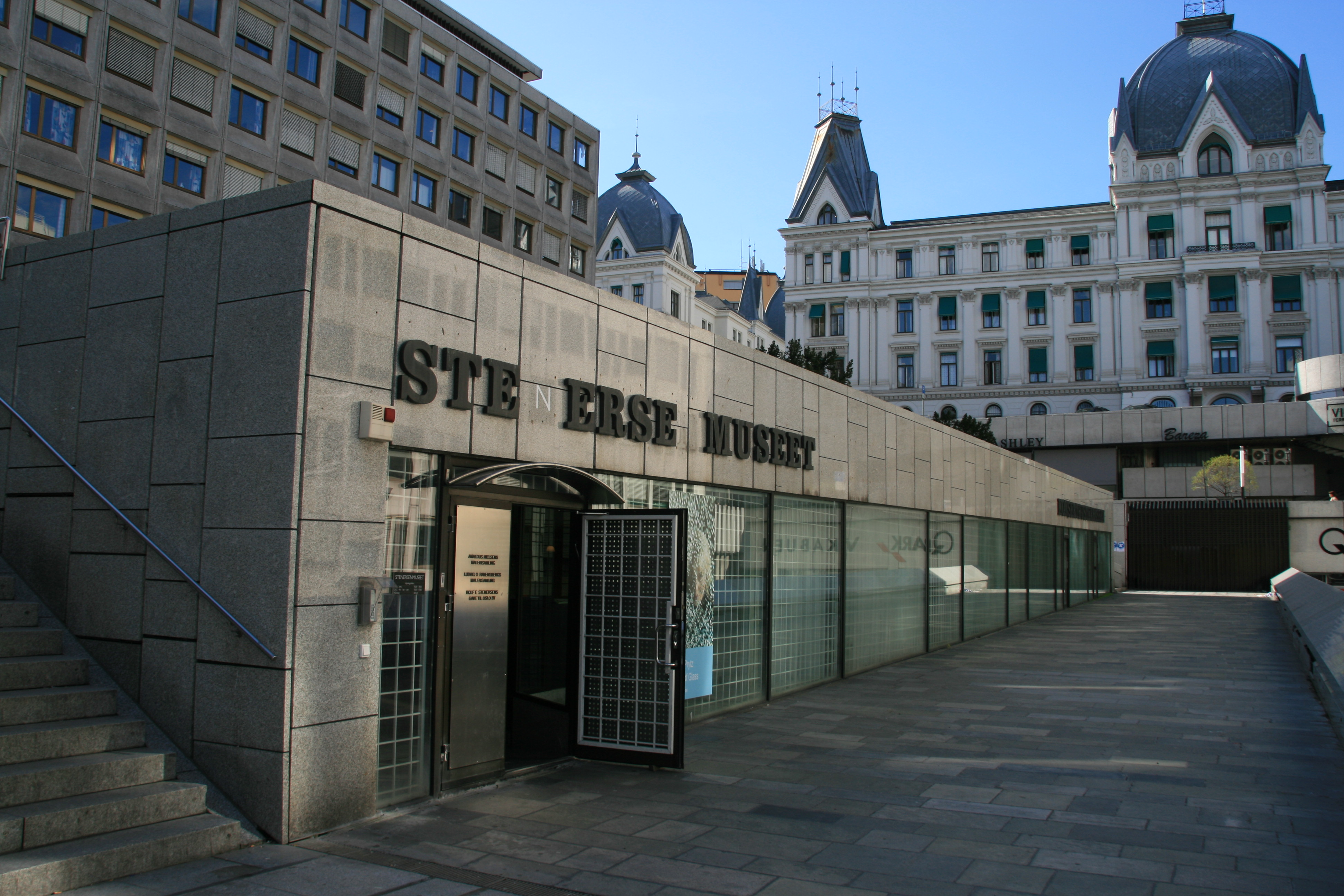 Stenersenmuseet er et norsk kunstmuseum i Oslo.